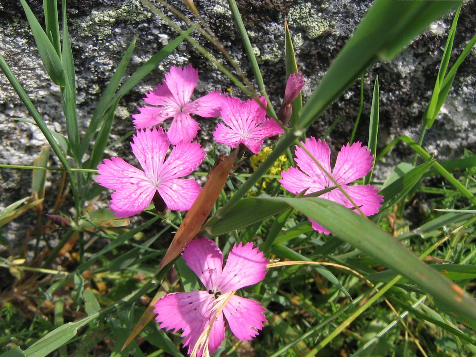 Oeillet des Bois (Dianthus sylvaticus) - Espèce particulière au massif central (France)